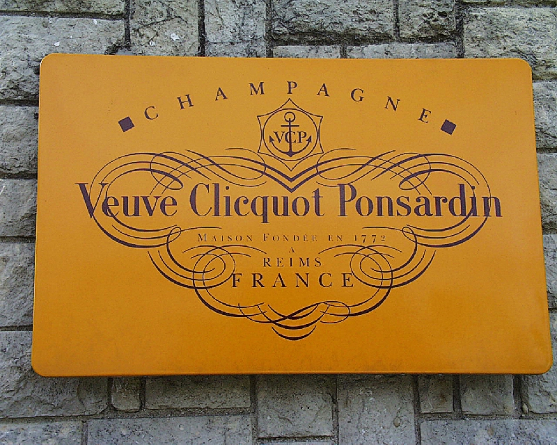 Bilder aus Reims